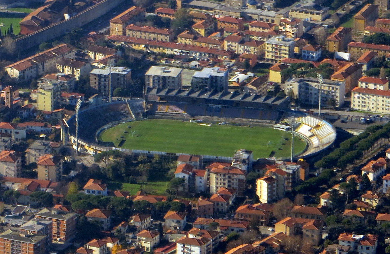 Vista area dell'Arena Garibaldi-Romeo Anconetani